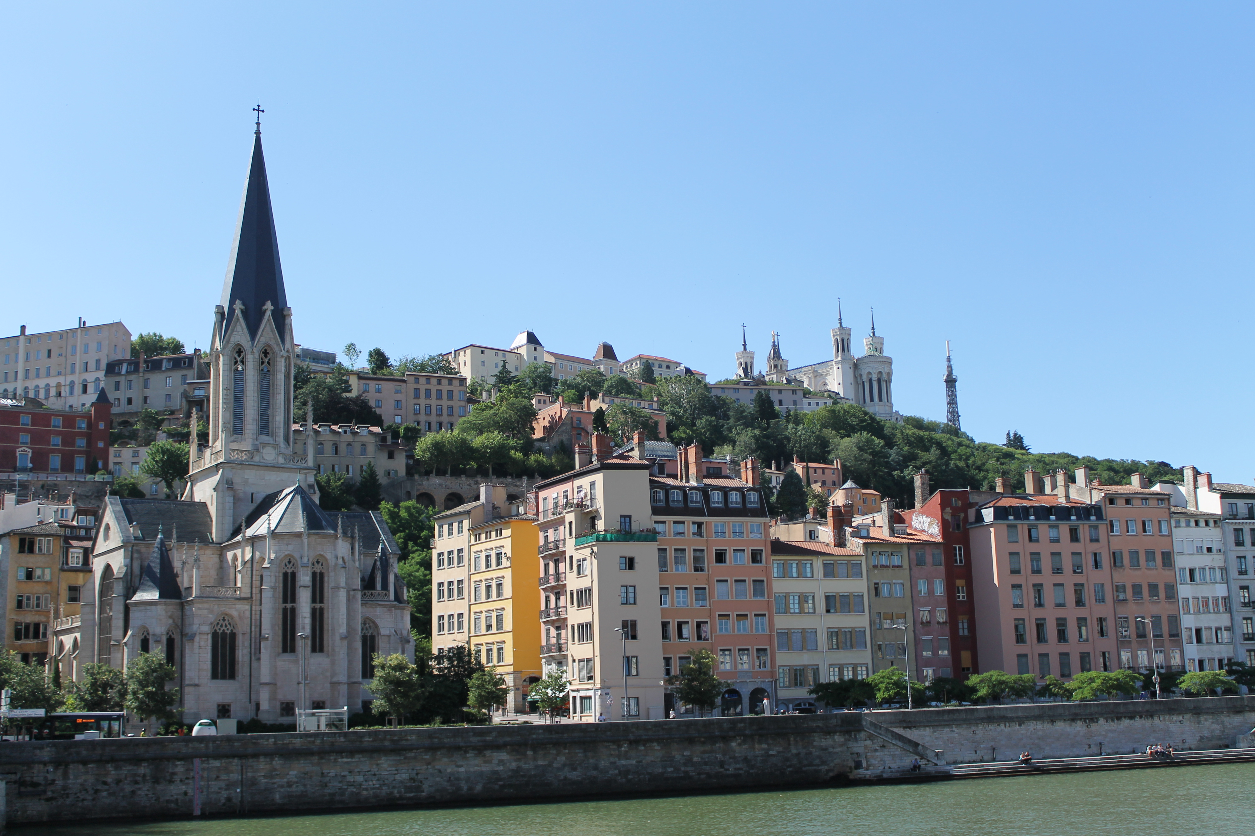 Lyon